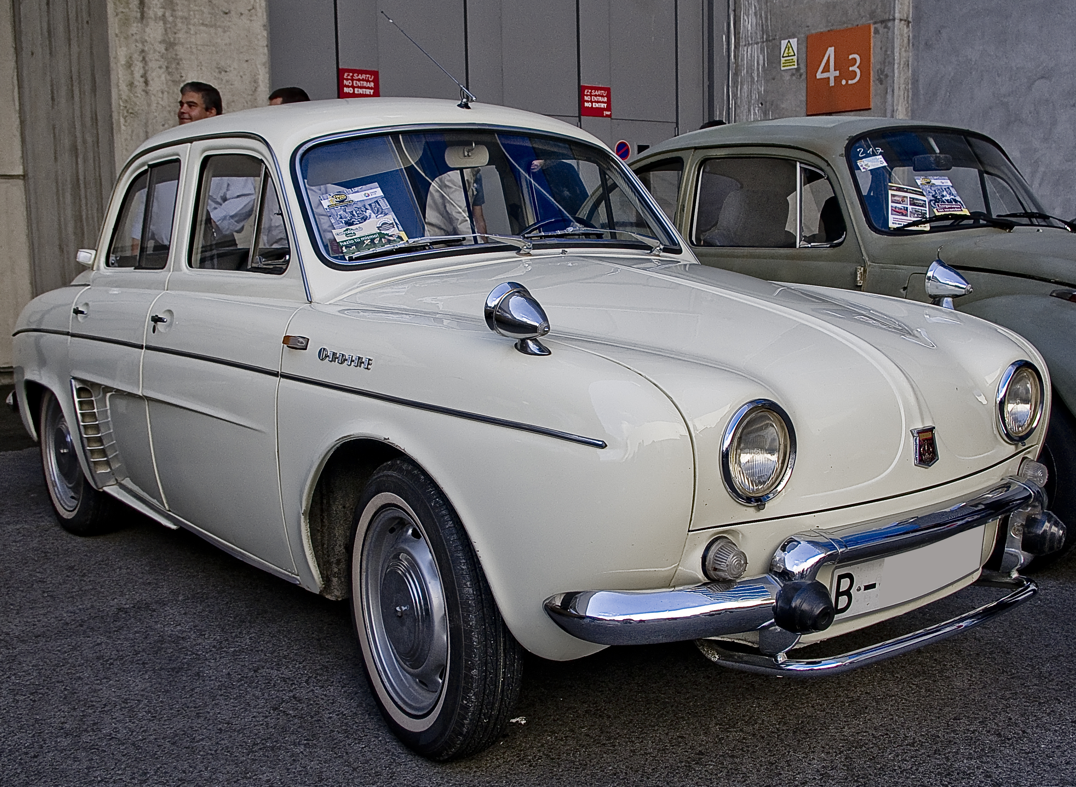 1965 Renault Ondine